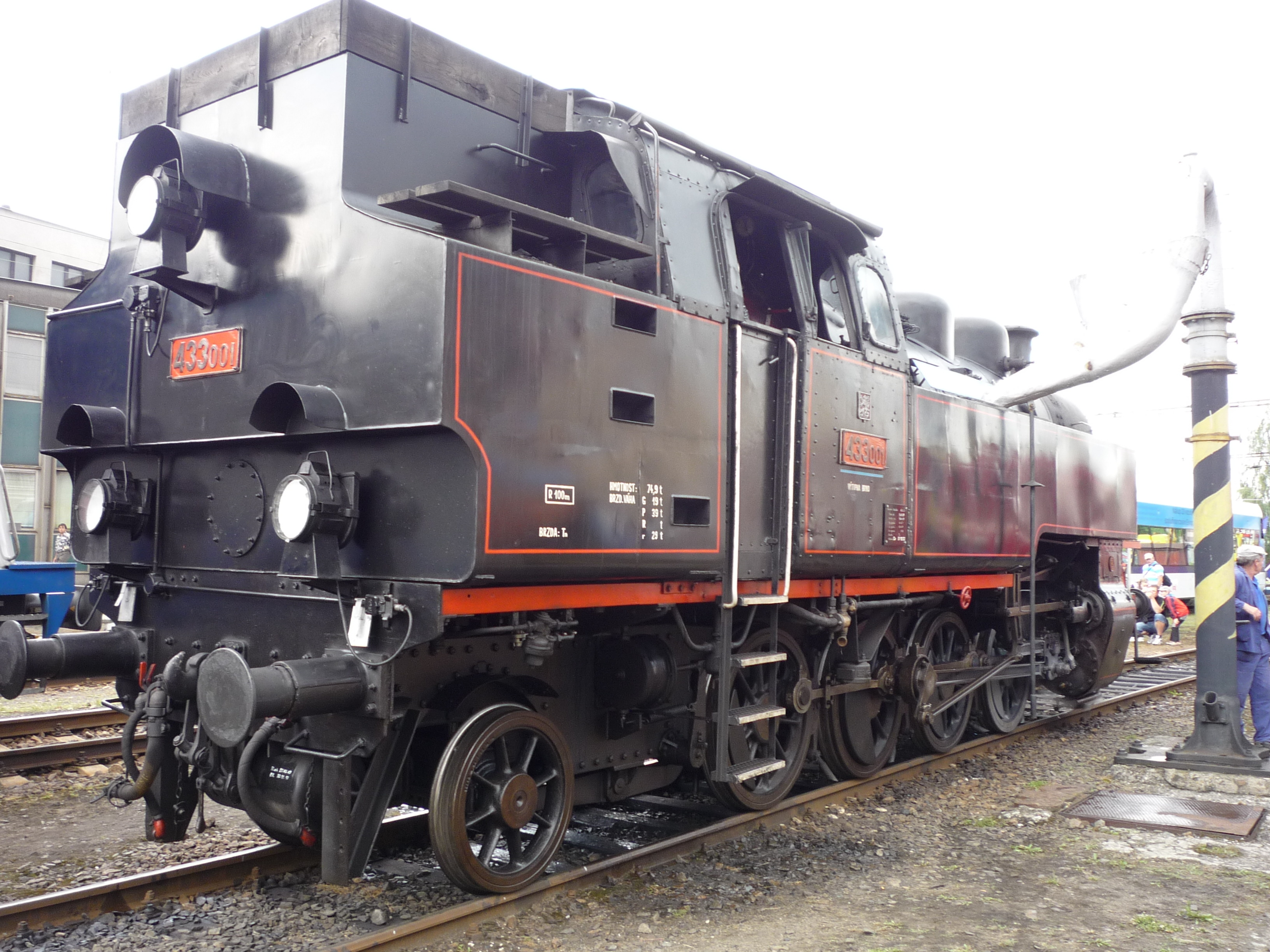 Autor fotografie Jiří Zelenka. Toulky Vysočinou. Den železnice 2011 na nádraží v Havlíčkově Brodě. Akce konaná dne 25.6.2011.